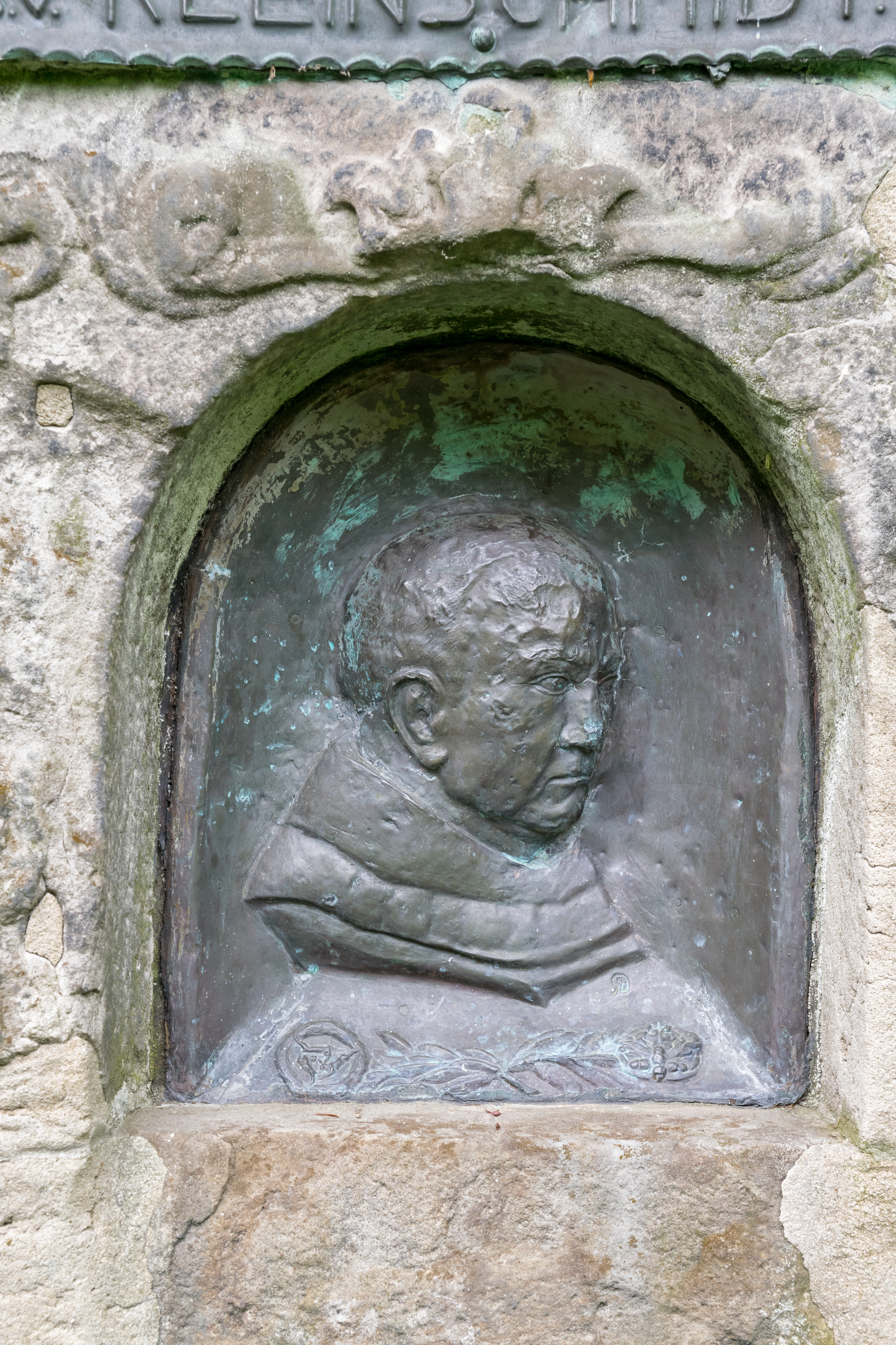 Bedastein am Eggeweg, Feldromer Berg, an der Grenze zwischen Feldrom (Horn-Bad Meinberg, Kreis Lippe) und Sandebeck (Steinheim, Kreis Höxter).